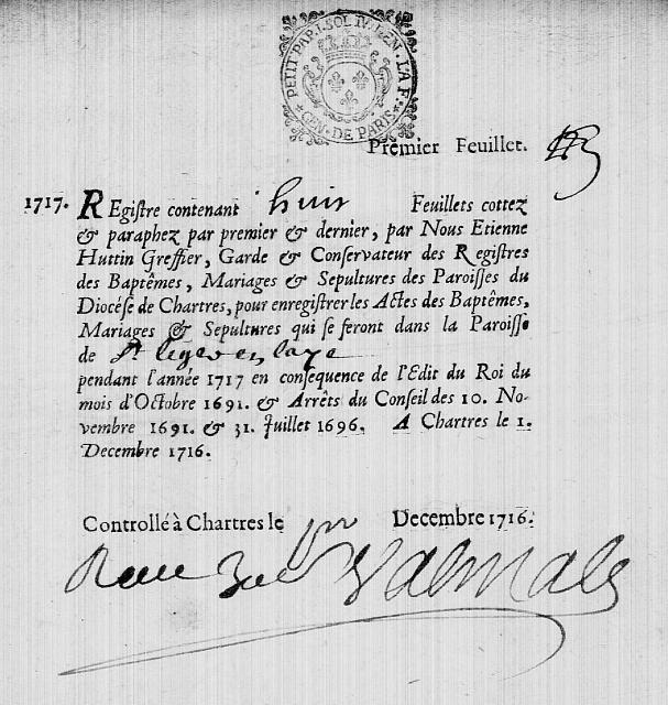 Première page pour l'année 1717 du registre paroissial (baptêmes, mariages et sépultures) de l'église Saint-Léger (Saint-Germain-en-Laye). On remarque que Saint-Léger-en-Laye est alors rattachée au diocèse de Chartres, tandis que sa voisine de Saint-Germain-en-Laye appartient alors au diocèse de Paris.